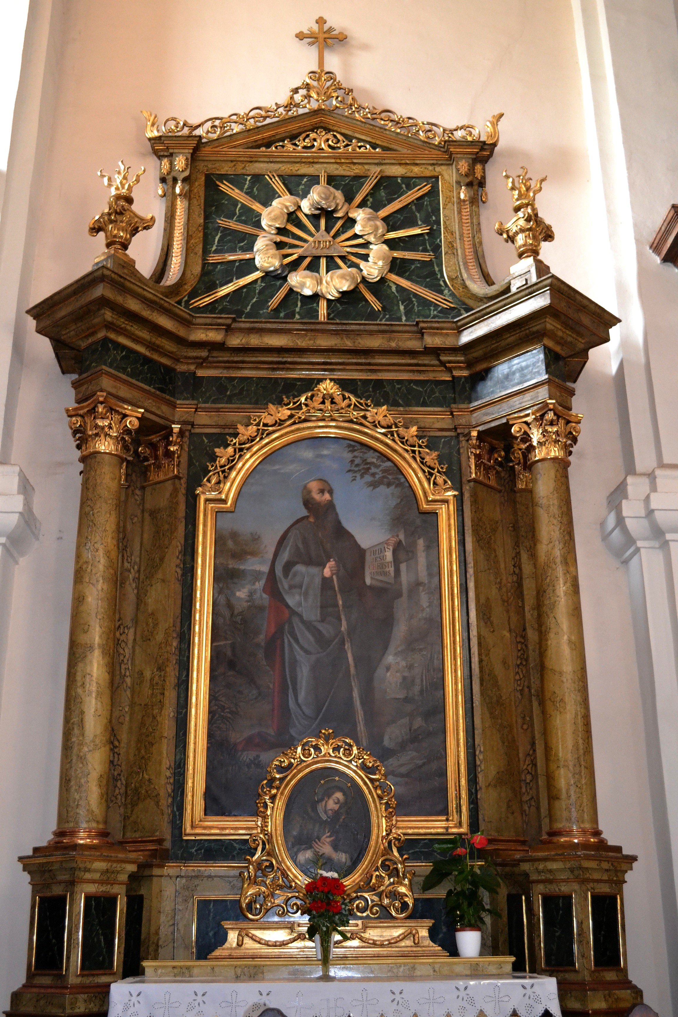 Oltár svätého Júdu Tadeáša v ľavej lodi z r. 1895